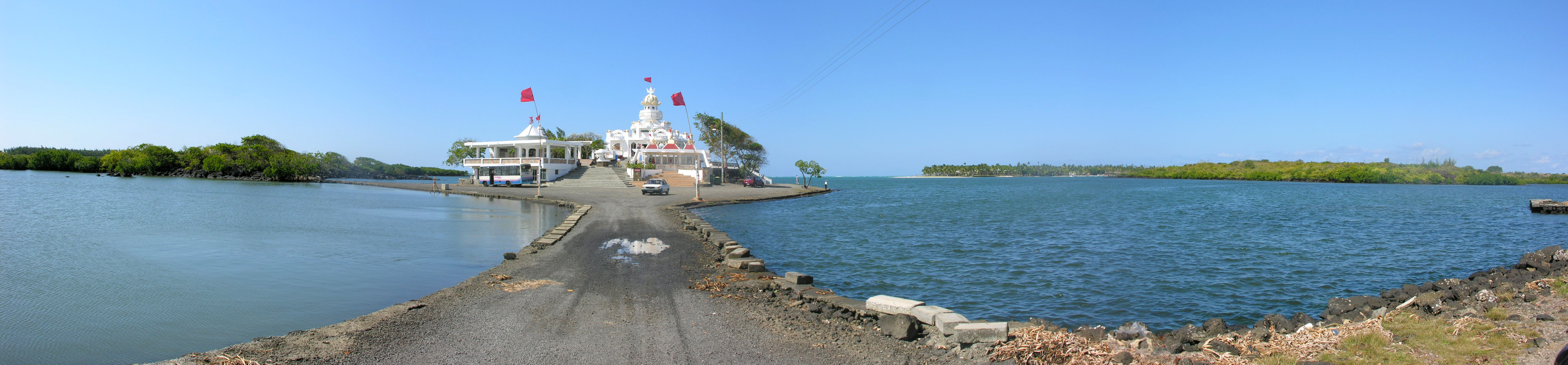 Mauritius, Shiv Sagar Mandir on Ilôt Goyave de Chine near Poste de Flacq